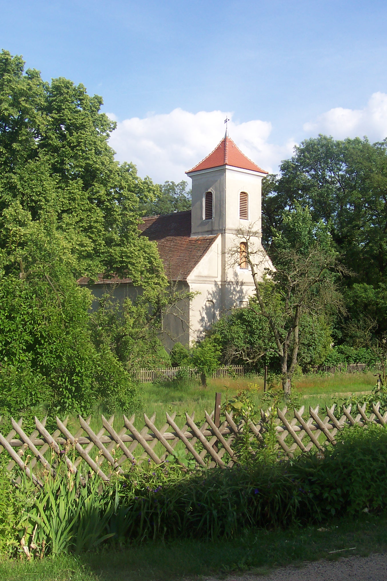 Kirche in Nattwerder für den deutschen Wikipedia-Artikel über Nattwerder